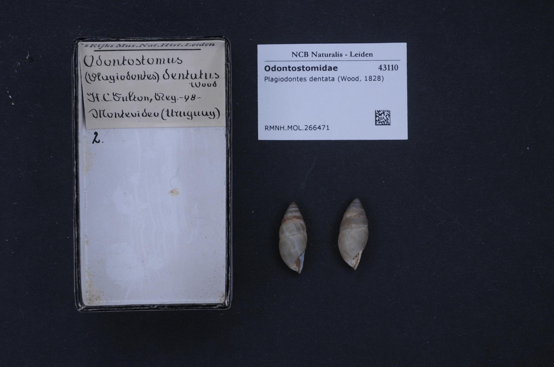 Plagiodontes dentata (Wood, 1828)